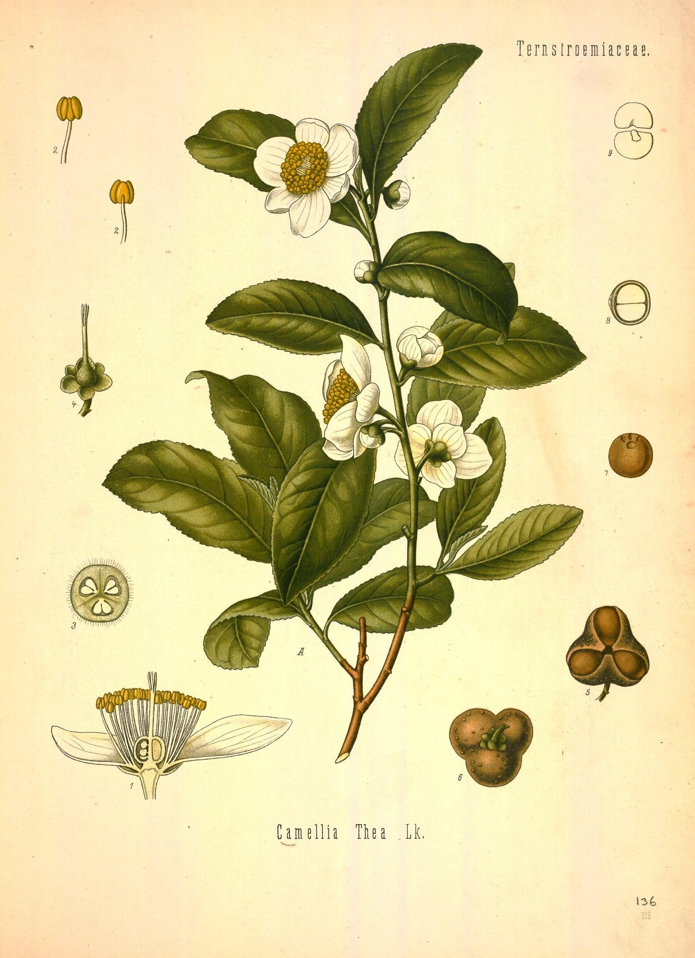 Teestrauch. A blühender Zweig, natürl. Grösse; 1 Blüthe im Längsschnitt, vergrössert; 2 Staubgefäss, desgl.; 3 Fruchtknoten im Querschnitt, desgl.; 4 Stempel mit Kelch, desgl.; 5 u. 6 reife Frucht von verschiedenen Seiten, mit Samen, natürl. Grösse; 7 Same mit Bindrücken der verkümmerten Samenknospen, desgl.; 8 derselbe zerschnitten, desgl.; 9 Embryo, desgl.